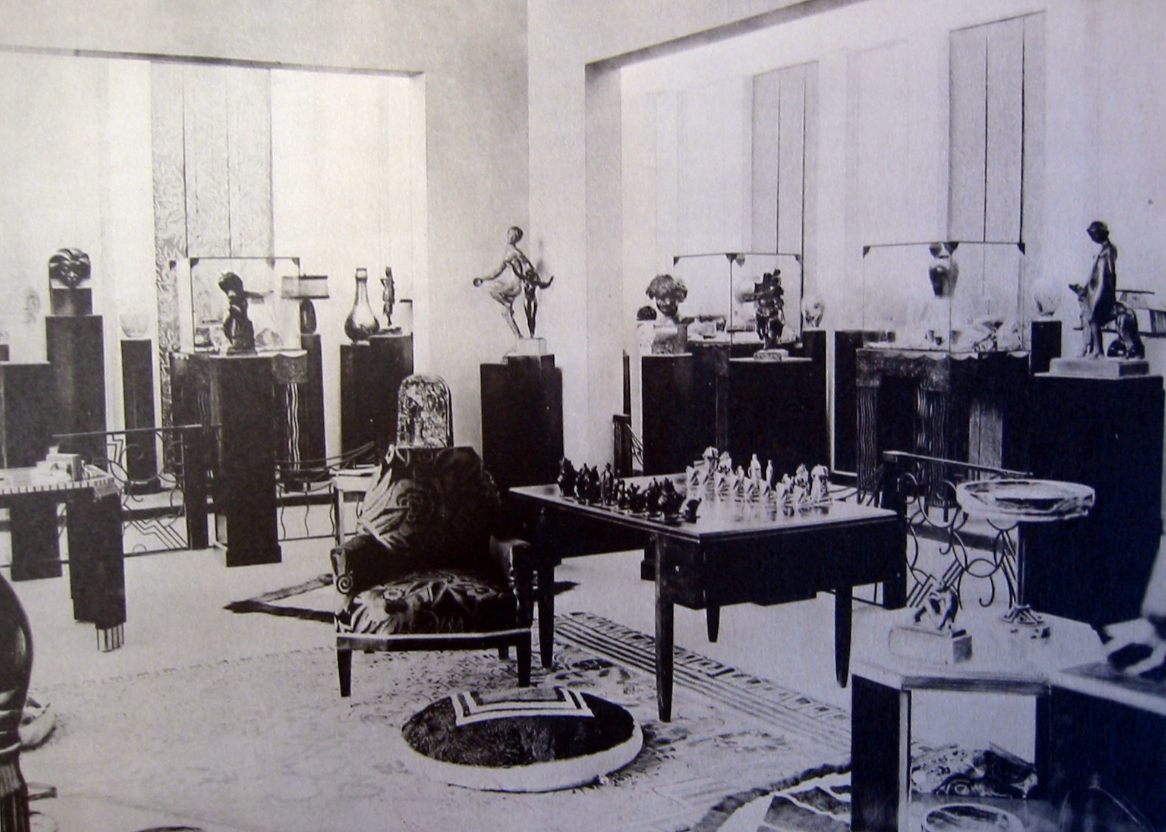 Arthur Goldscheiders Ausstellungsraum der Künstlergruppen La Stèle und L’Evolution auf der Ausstellung Exposition internationale des Arts Décoratifs et industriels modernes, Paris 1925